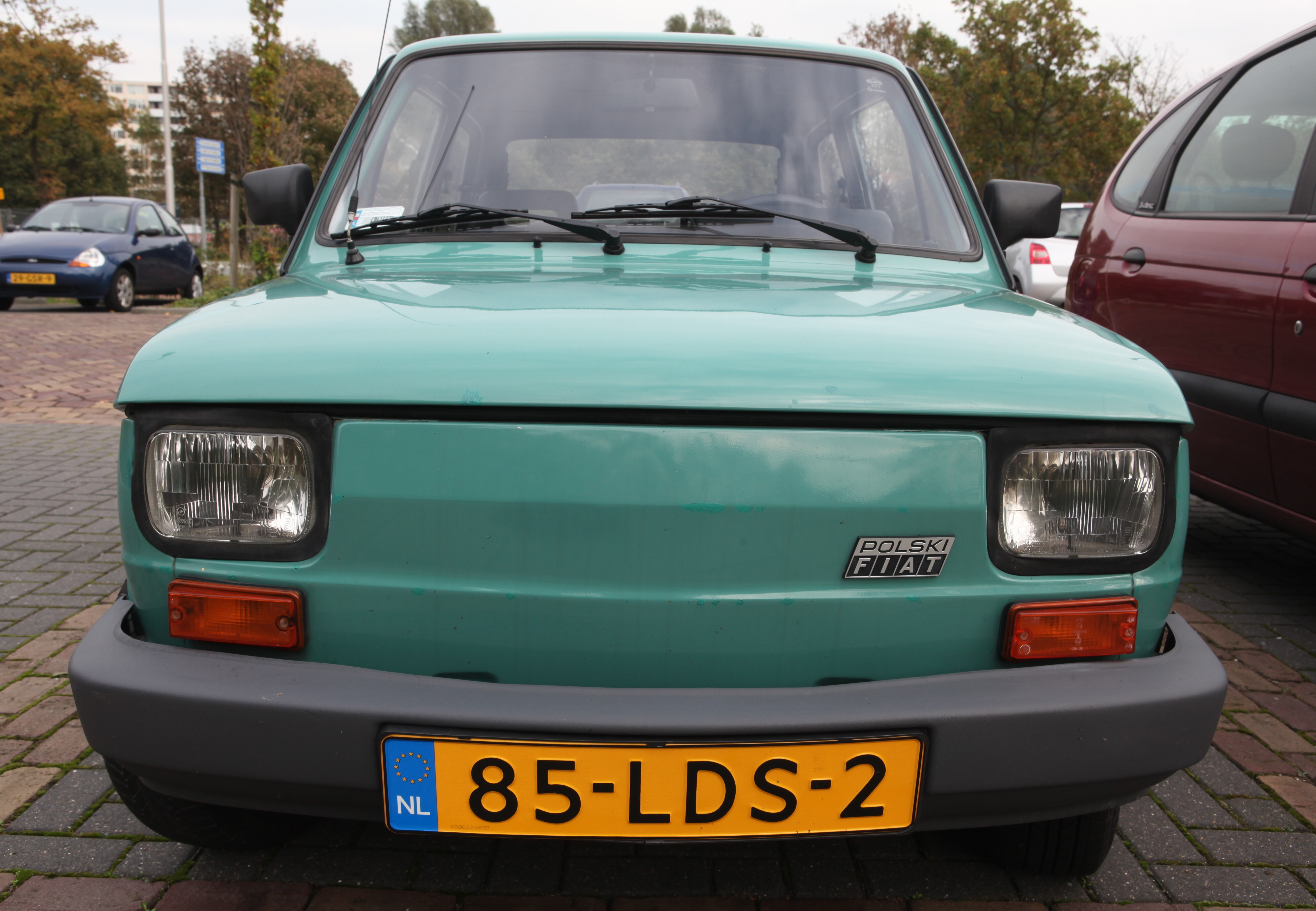 Polski Fiat 126P 650 E Made by FSM